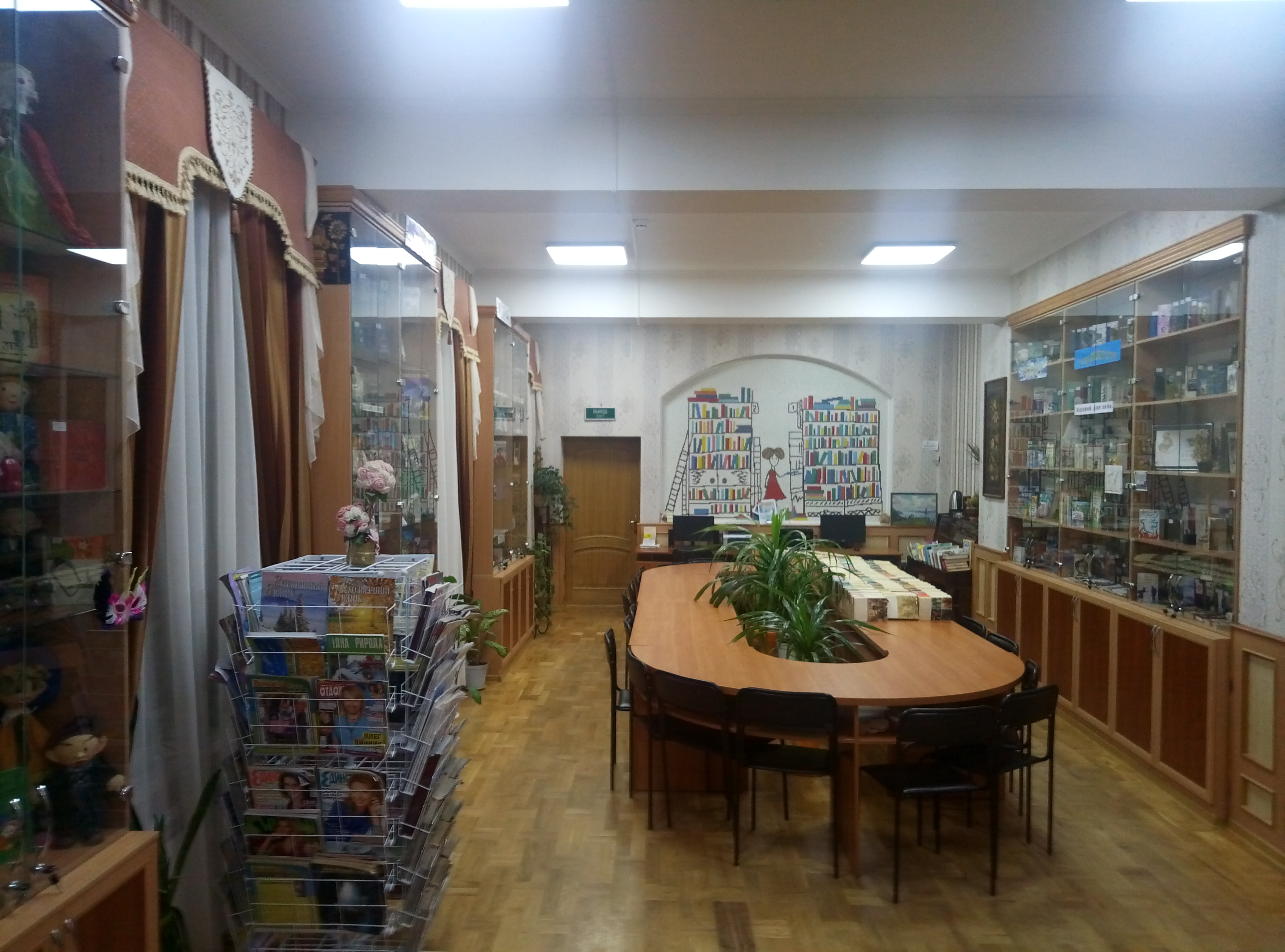 Загальний вигляд читального залу Центральної дитячої бібліотеки Московського району м. Харкова